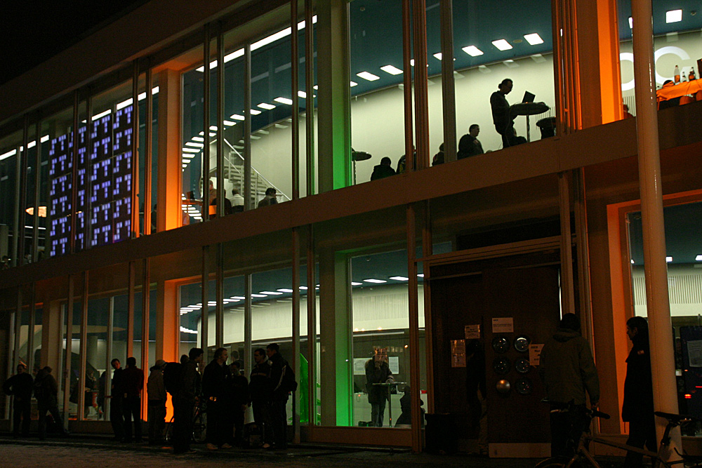 Impression vom 22C3, 2005, bcc